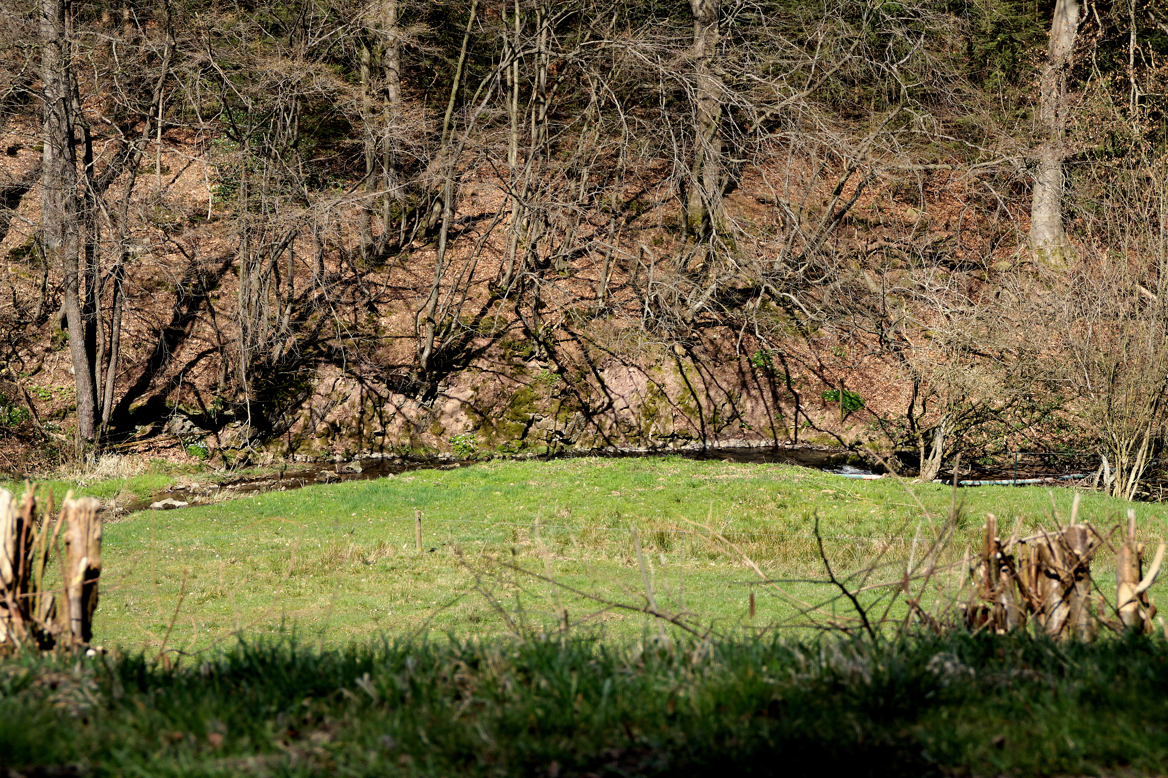 Den Tûron a sengem Dall